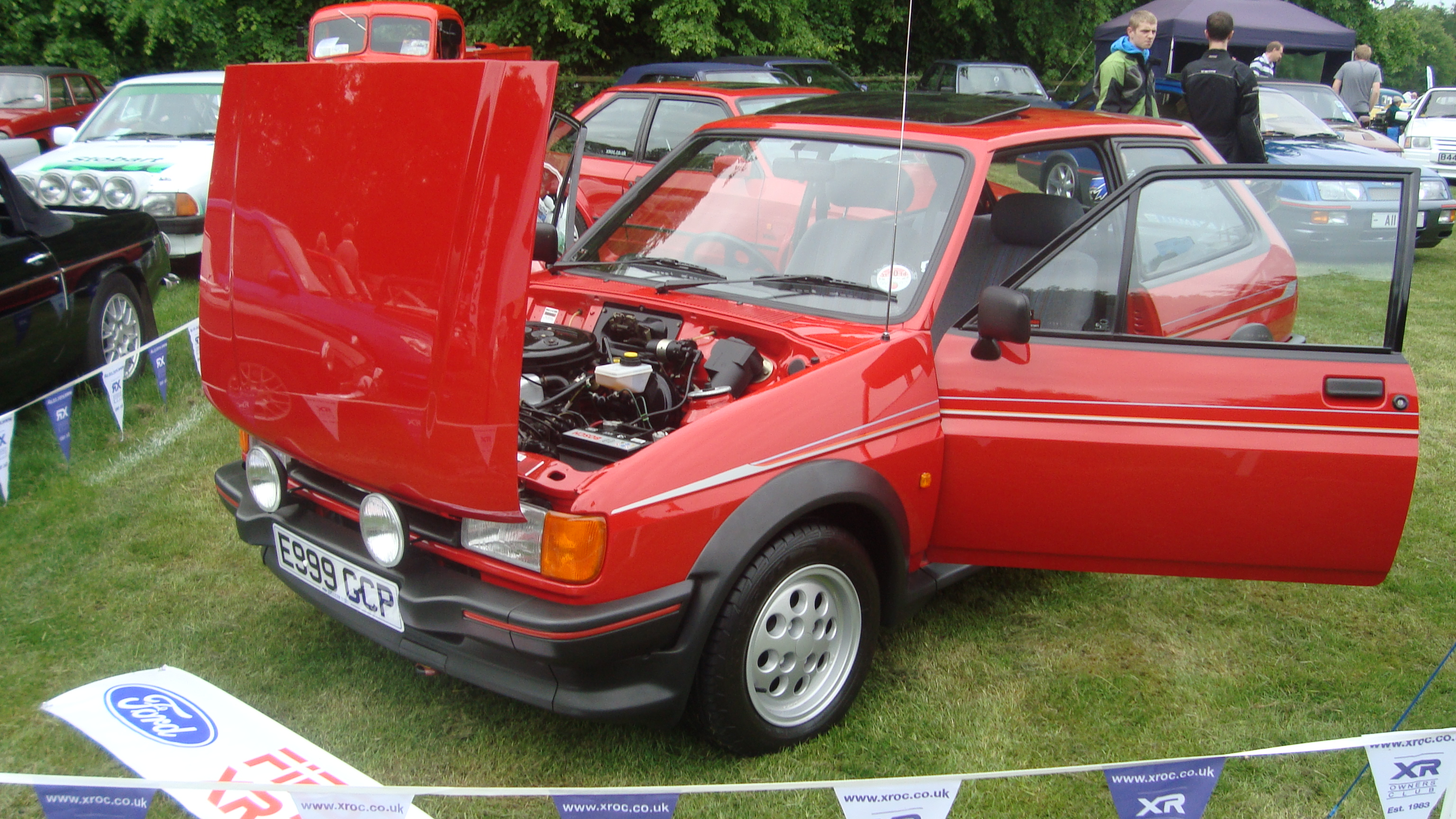 1987 Ford Fiesta XR2